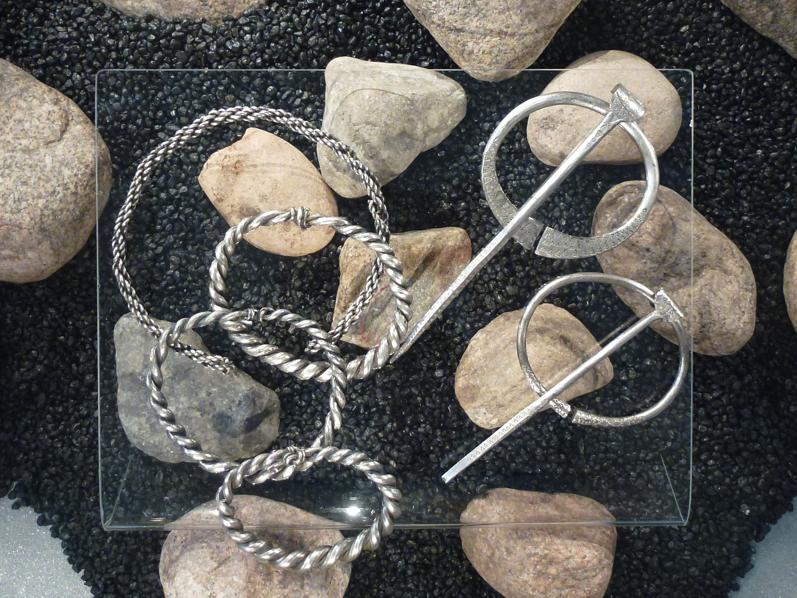 Några föremål ur Finbodaskatten